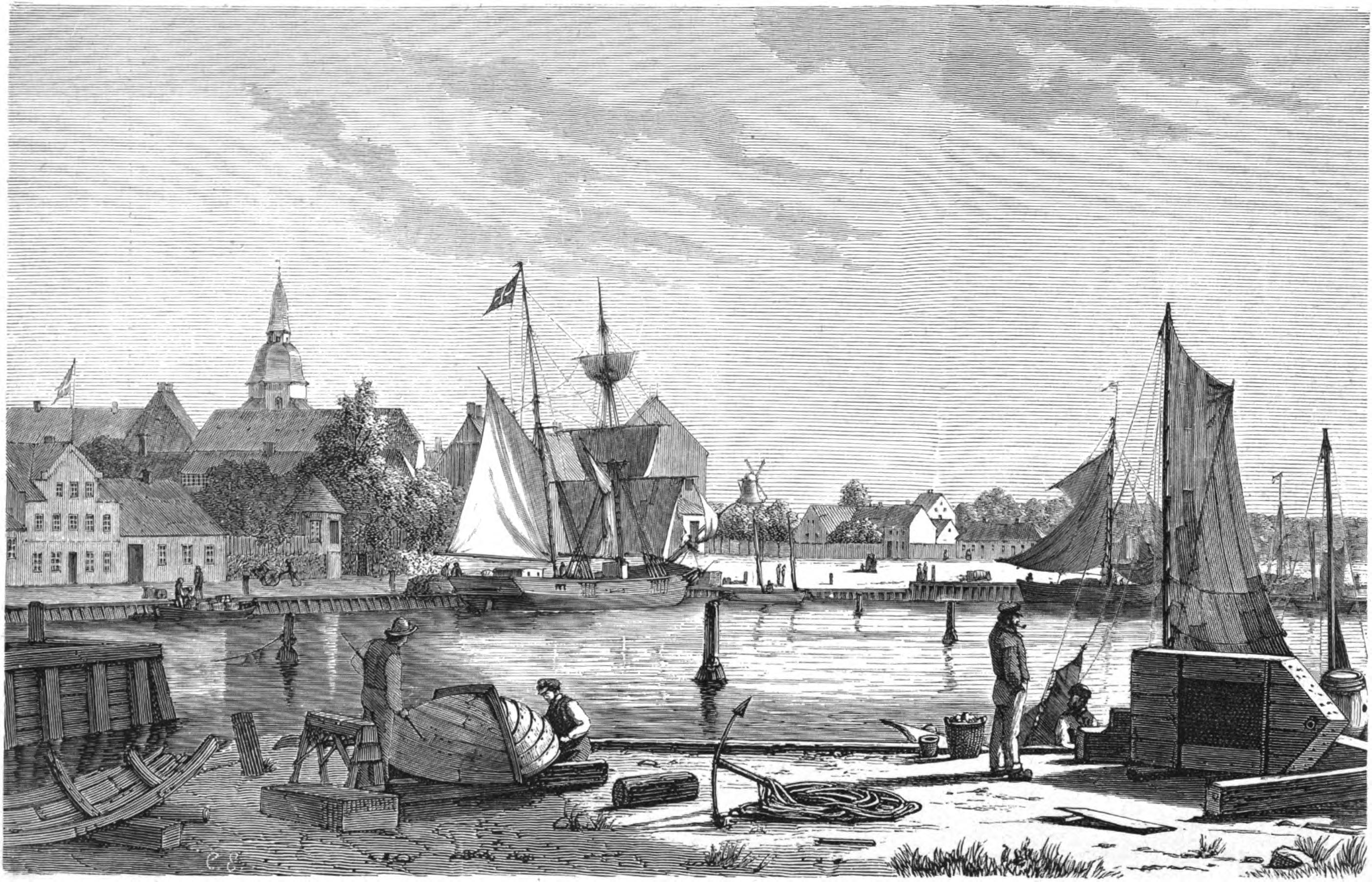 Faaborgs havn.